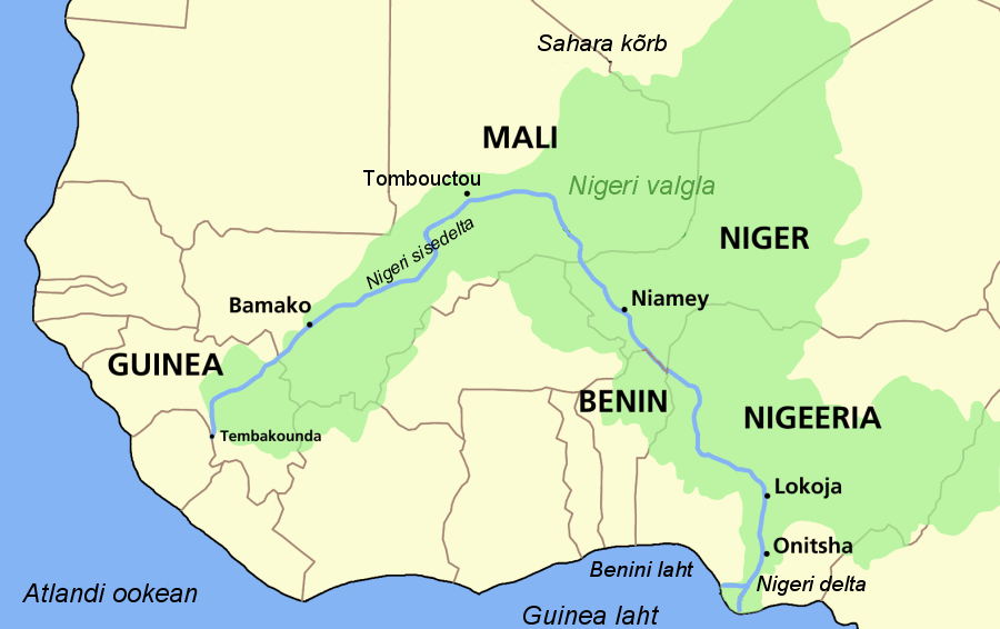 Nigeri jõe kaart